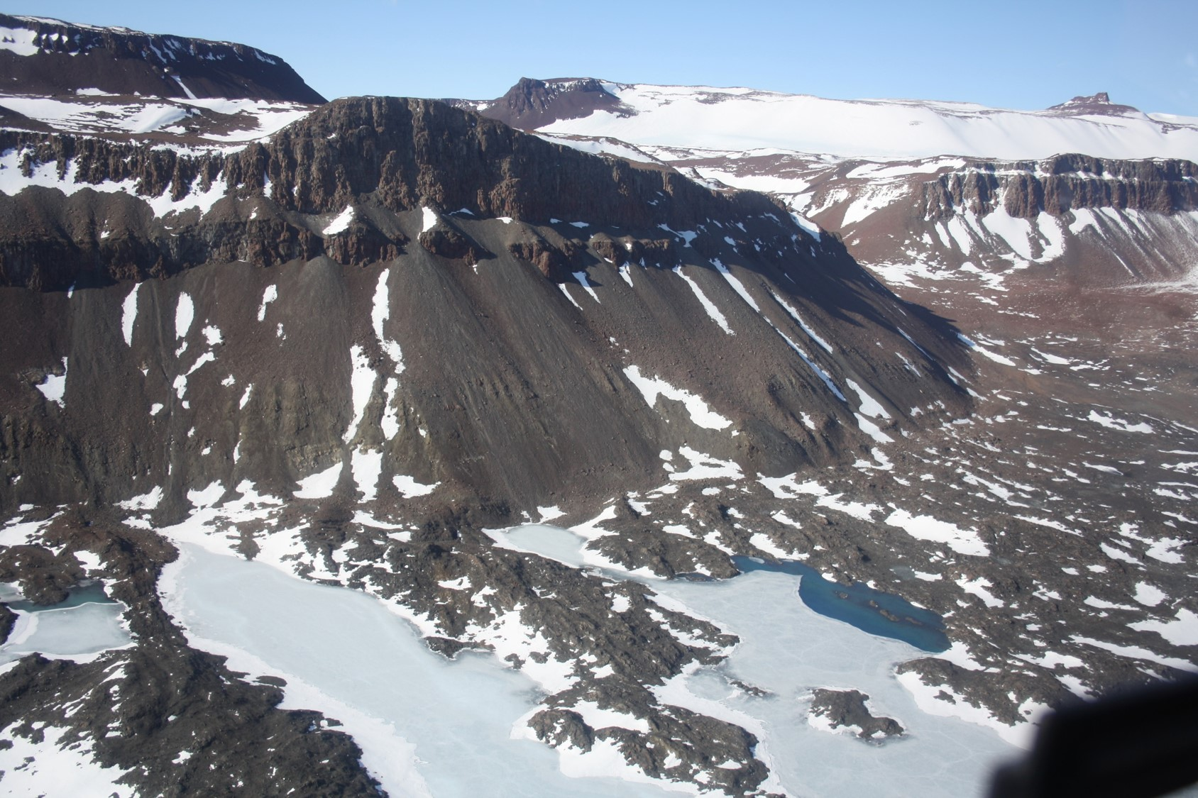 Wer glaubt, dass es in unserer globalisierten Welt keine Abenteuer für Forscher mehr gibt, der kann sich eines Besseren belehren lassen und sich an einer Expedition in die Antarktis beteiligen. Für die Expedition GANOVEX 11 sind im Dezember 2015 drei Forscher des DLR-Instituts für Planetenforschung in Berlin in Richtung Südpol aufgebrochen, um für die internationale Planetenforschung noch unbekannte antarktische Gebiete zu erkunden und gemäß ihrer geologisch-geomorphologischen Besonderheiten mit Strukturen auf dem Mars zu vergleichen. Zur Blogreihe #ExpeditionAntarktis